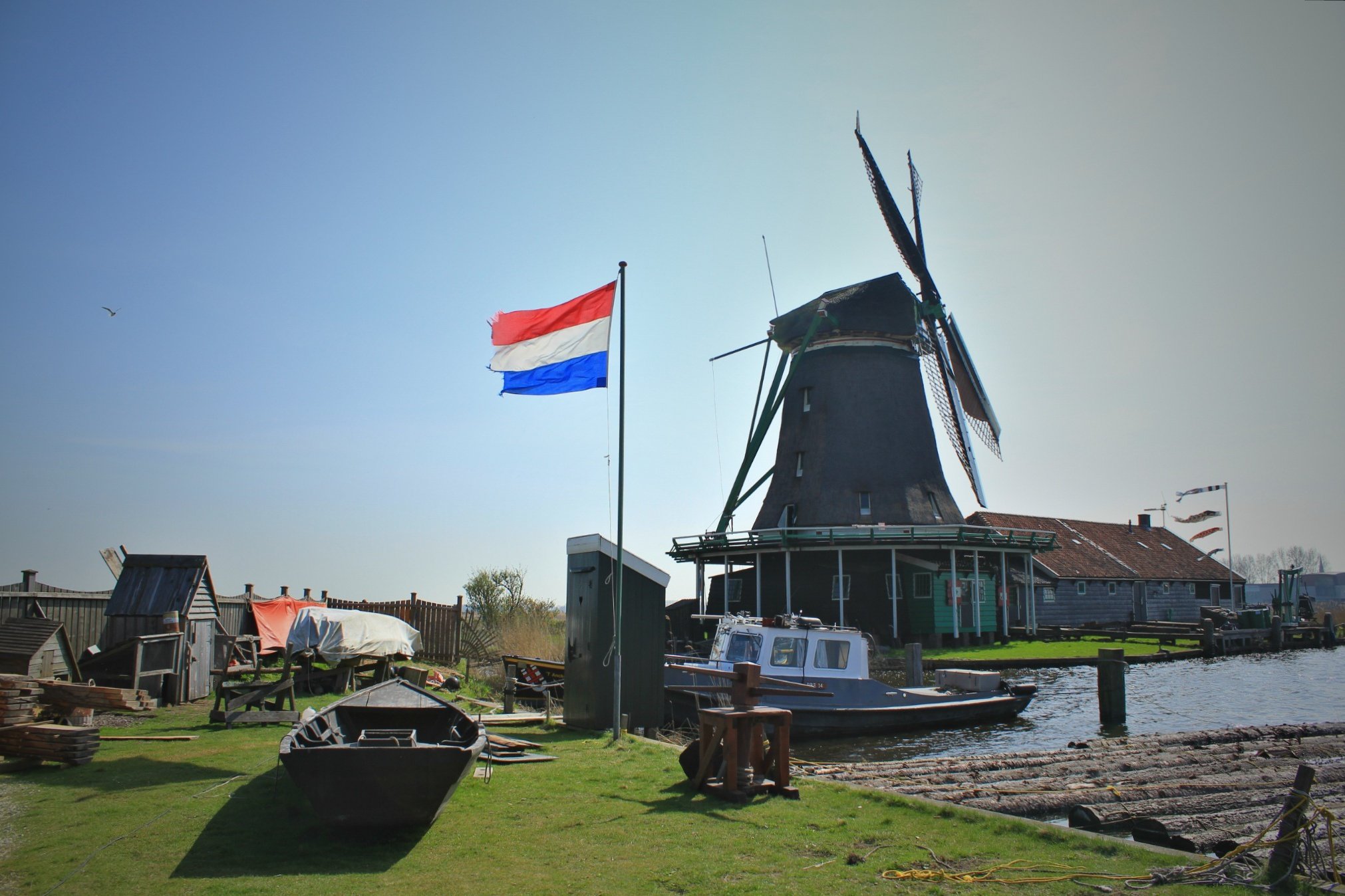 Вид с территории мельницы-лесопилки, Заансе Сханс.